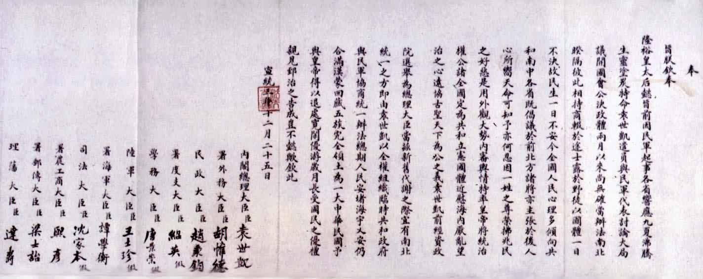 宣統三年十二月二十五日，清遜帝頒佈退位詔書。